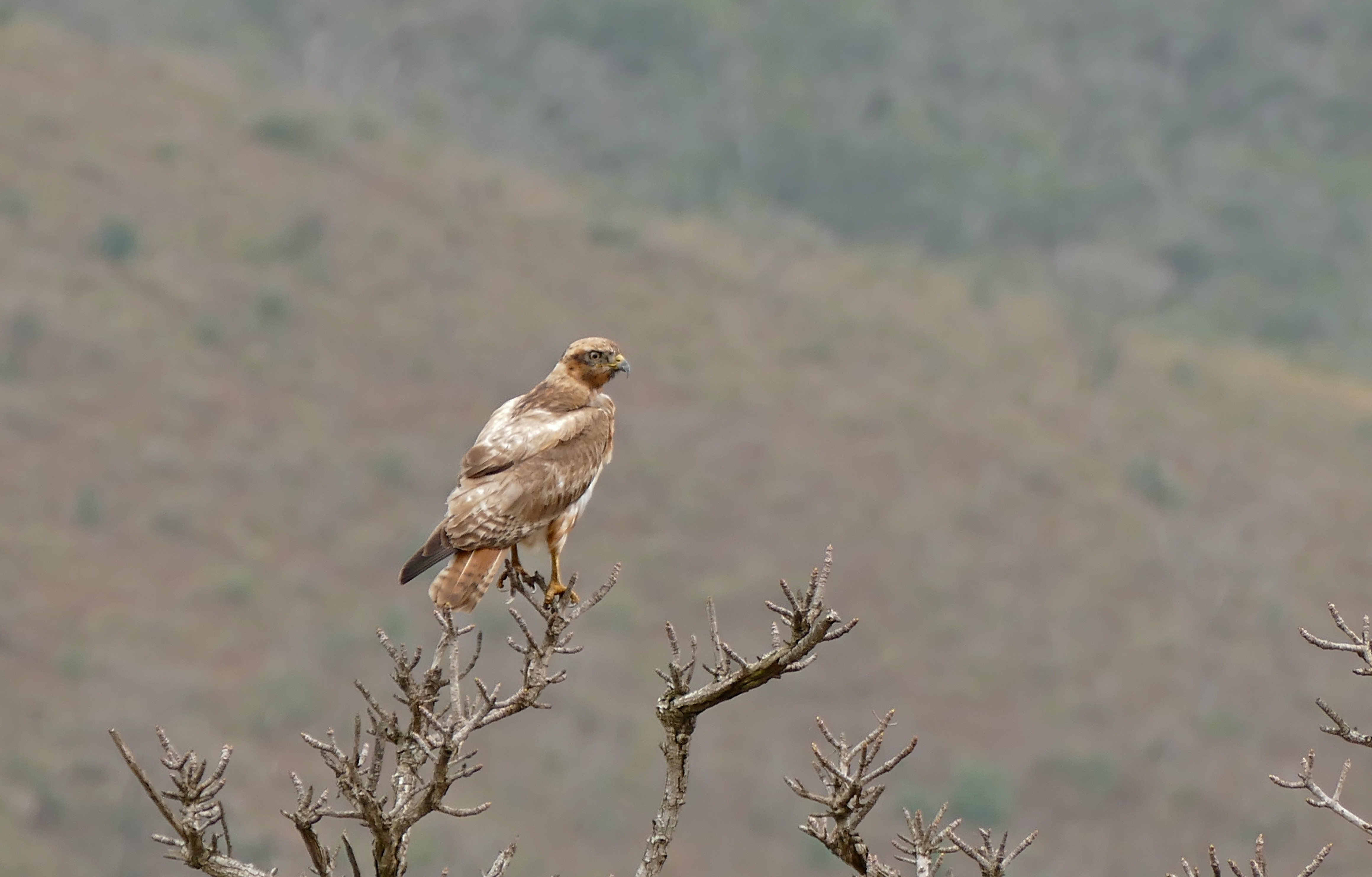 Hluhluwe Game Reserve, Hluhluwe-iMfolozi Park, Kwazulu-Natal, SOUTH AFRICA